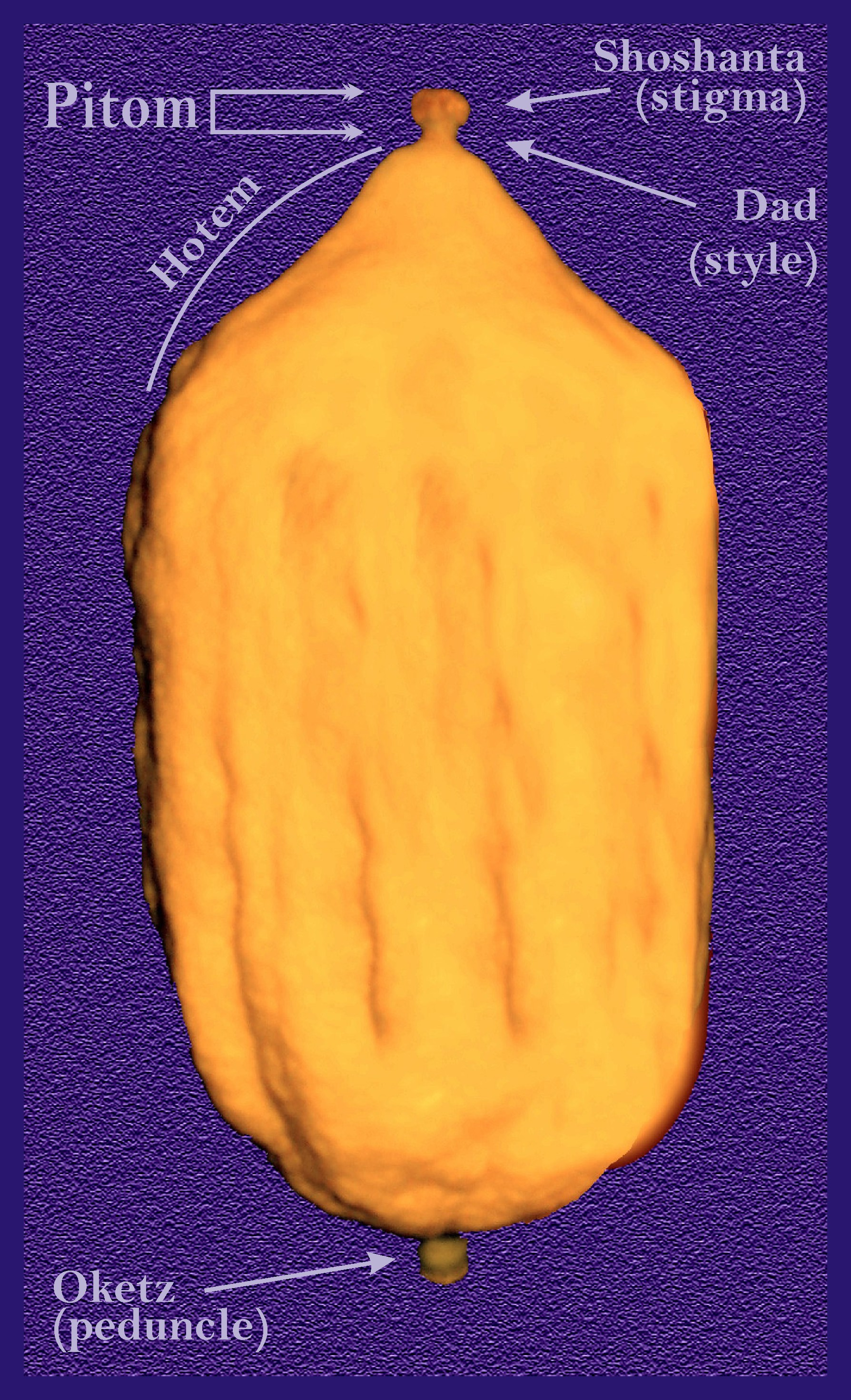 Etrog_diagram